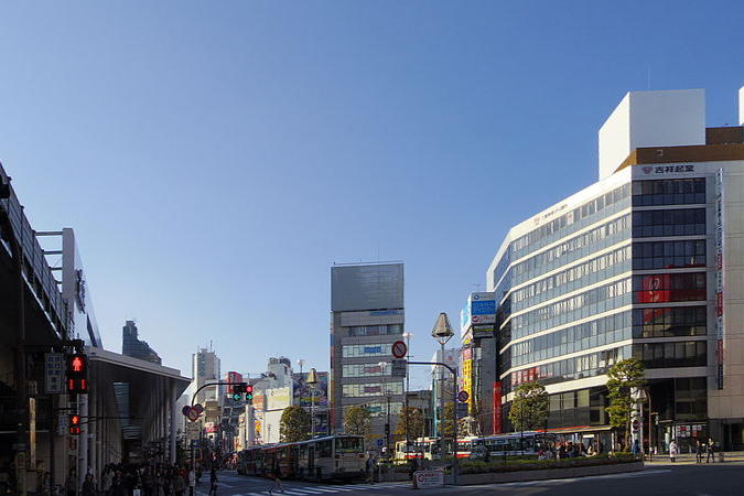 吉祥寺駅北口駅前広場。 2014年11月23日撮影。